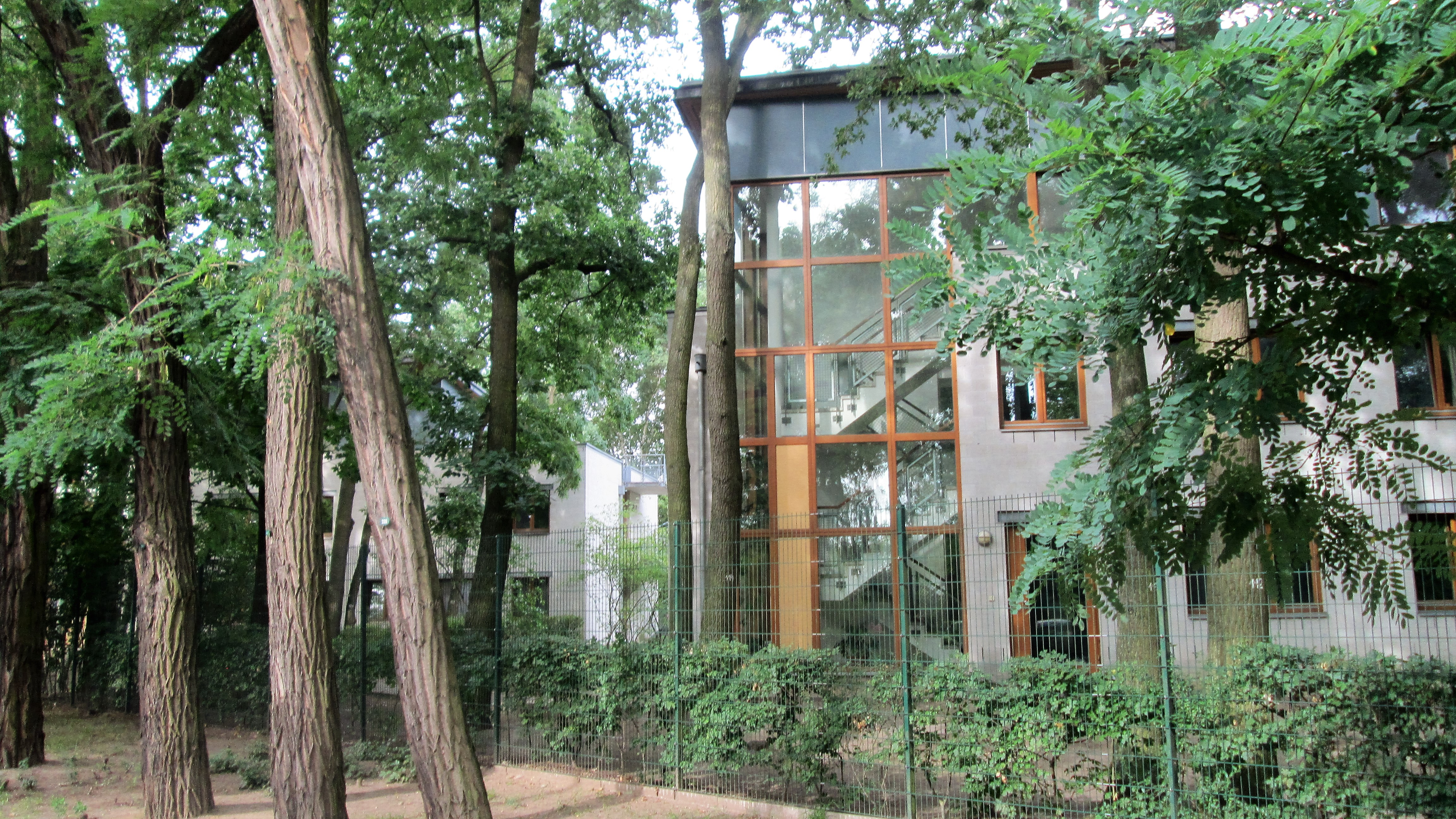 Justizvollzugsanstalt Berlin-Hakenfelde, Blick von Niderneuendorfer Allee